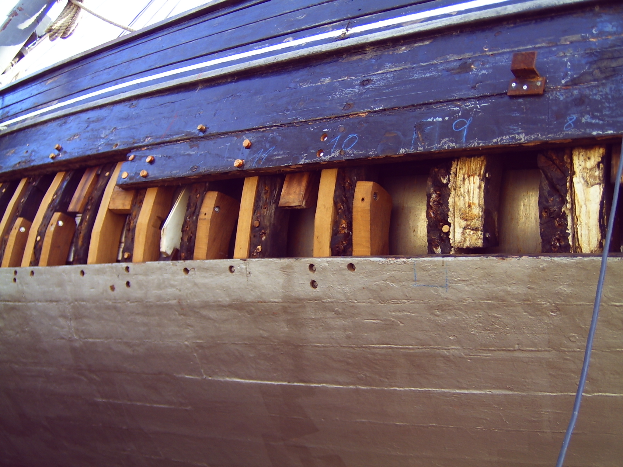 Nellie & Leslie, ein ehemaliger englischer Kutter